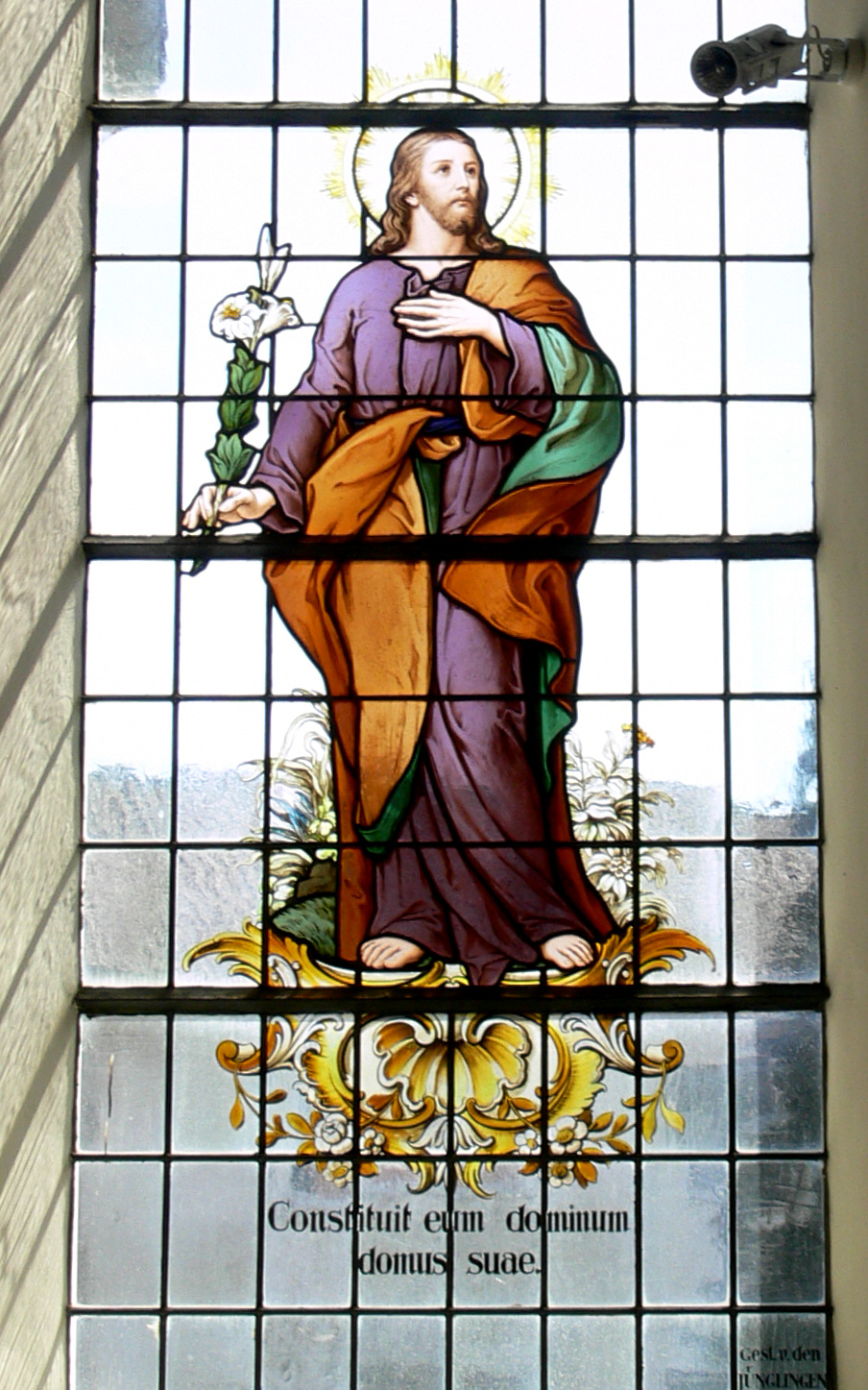 Pfarrkirche St. Konrad und Vinzenz, Fronhofen, Gemeinde Fronreute, Landkreis Ravensburg Fenster "Constituit eum dominum domus suae" (Psalm 104 (bzw. 105), 21)